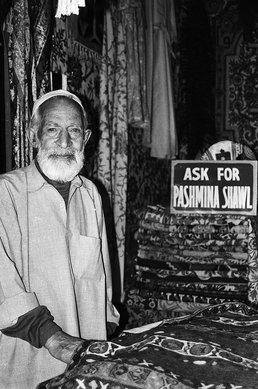 A kashmiri man sells pashmina shawl in New Delhi market